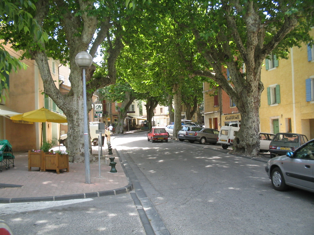 Malaucène